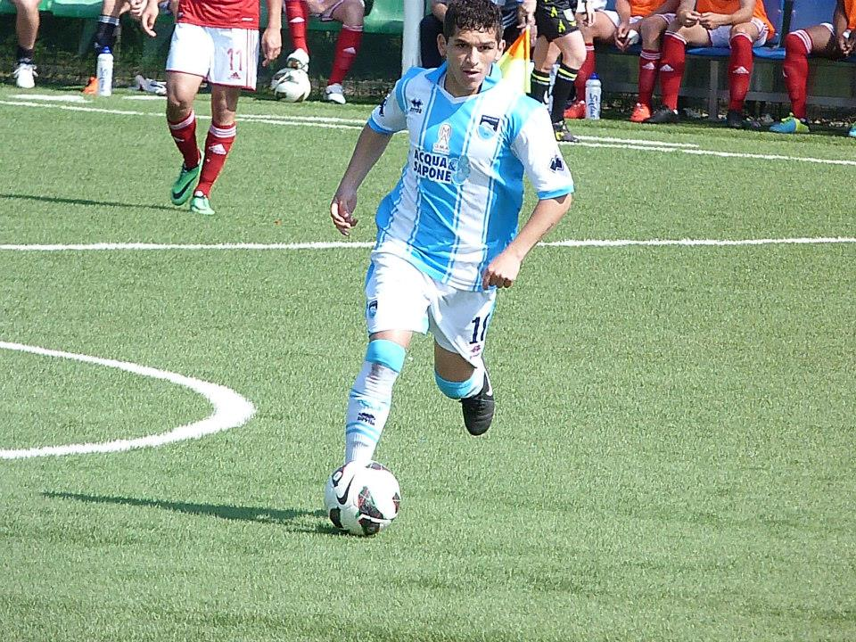 Ex jugador de Institución Atlética 18 de Julio y Wanders F.C